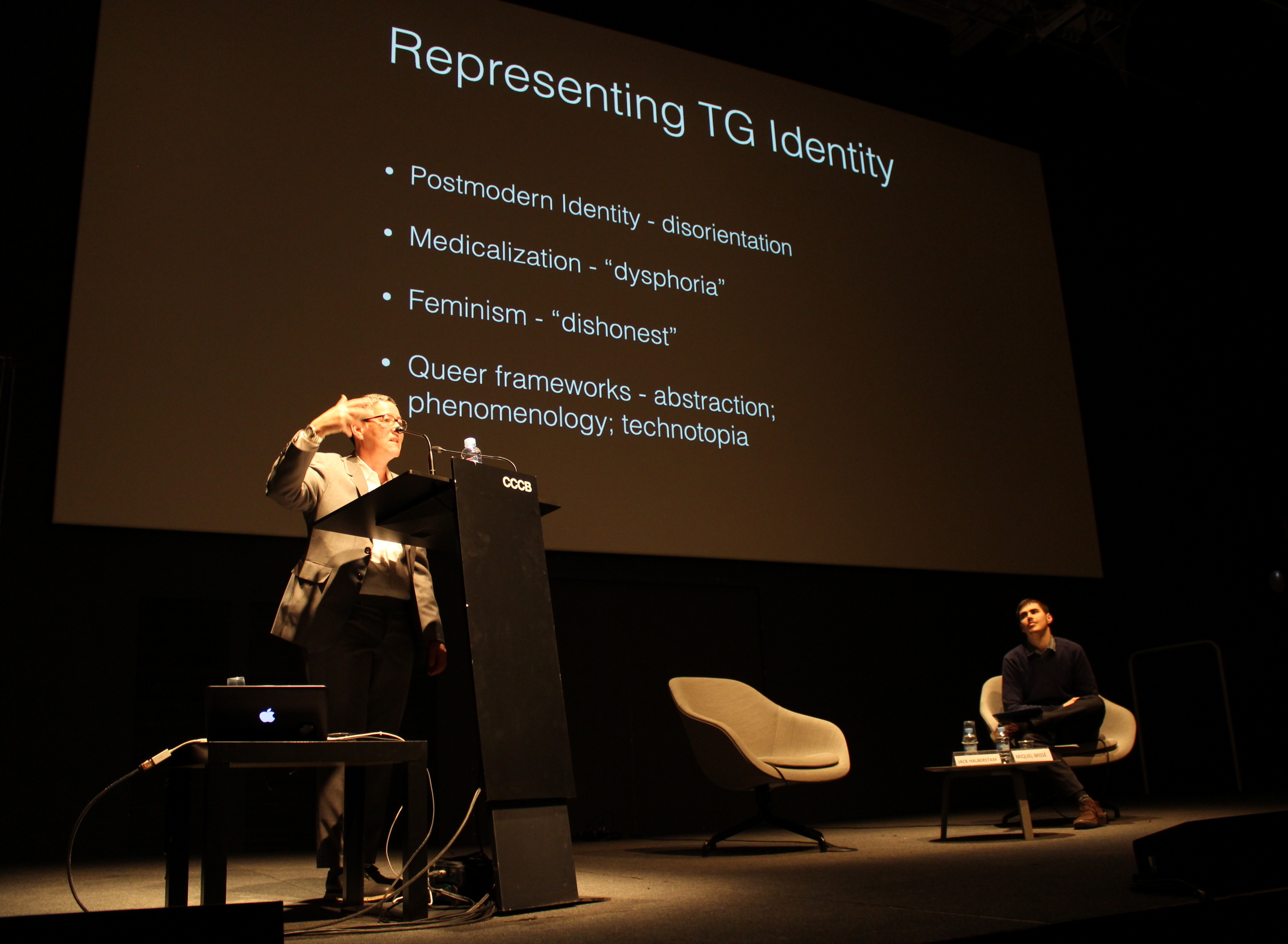 Jack Halberstam donant la congerència "Cossos Trans*", amb l'activista pels drets LGBT+ Miquel Missé Sánchez seient a la dreta. Conferència feta al teatre del CCCB (Centre de Cultura Contemporània de Barcelona) el dimecres 1 de febrer del 2017.